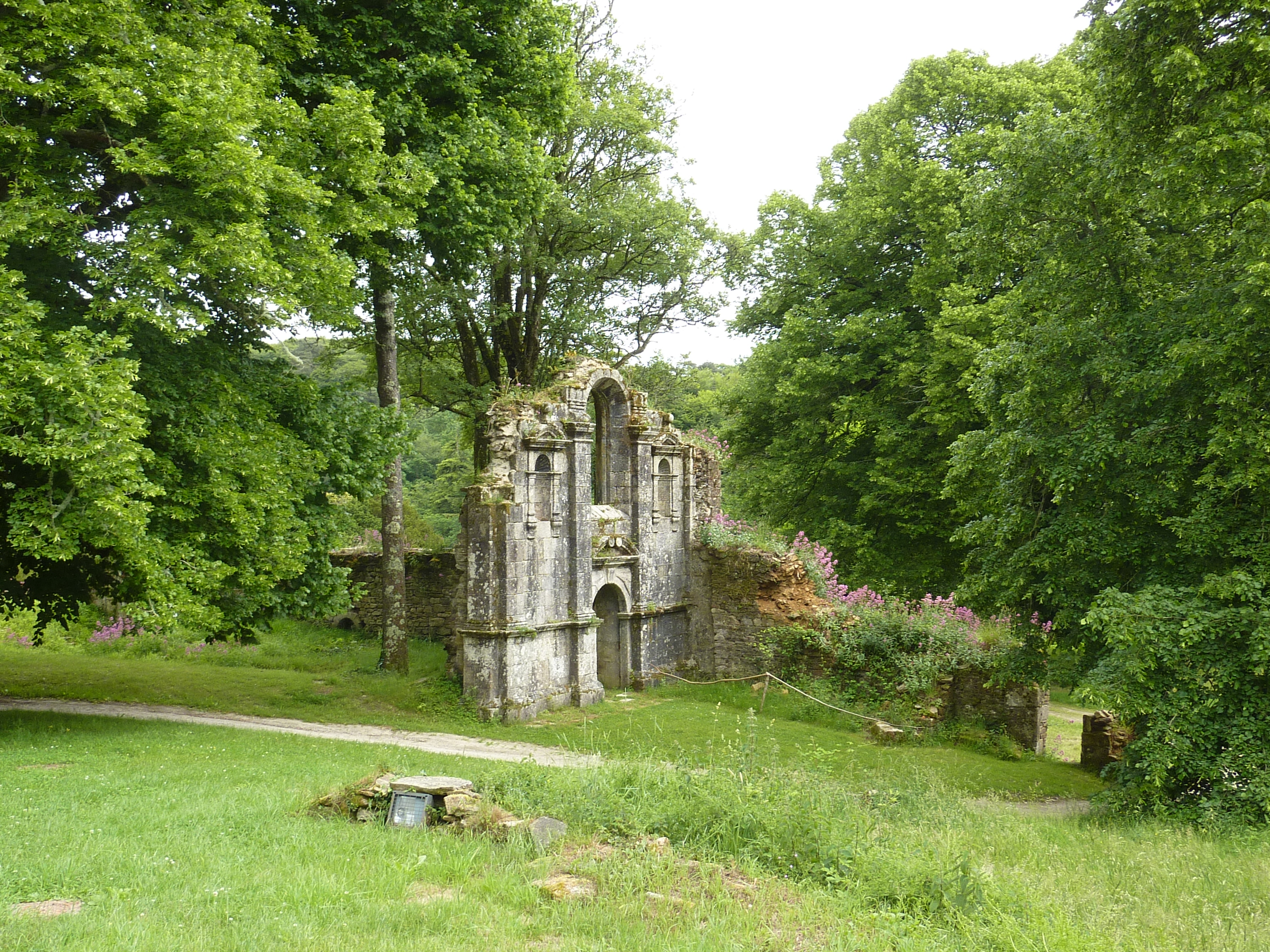 Abbaye Saint-Maurice de Carnoët Le fronton de l'église abbatiale dans son cadre de verdure